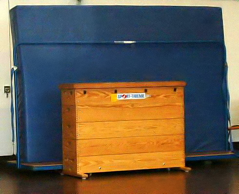 Turngeräte für den Sportunterricht: Kasten und dahinter ein Weichboden